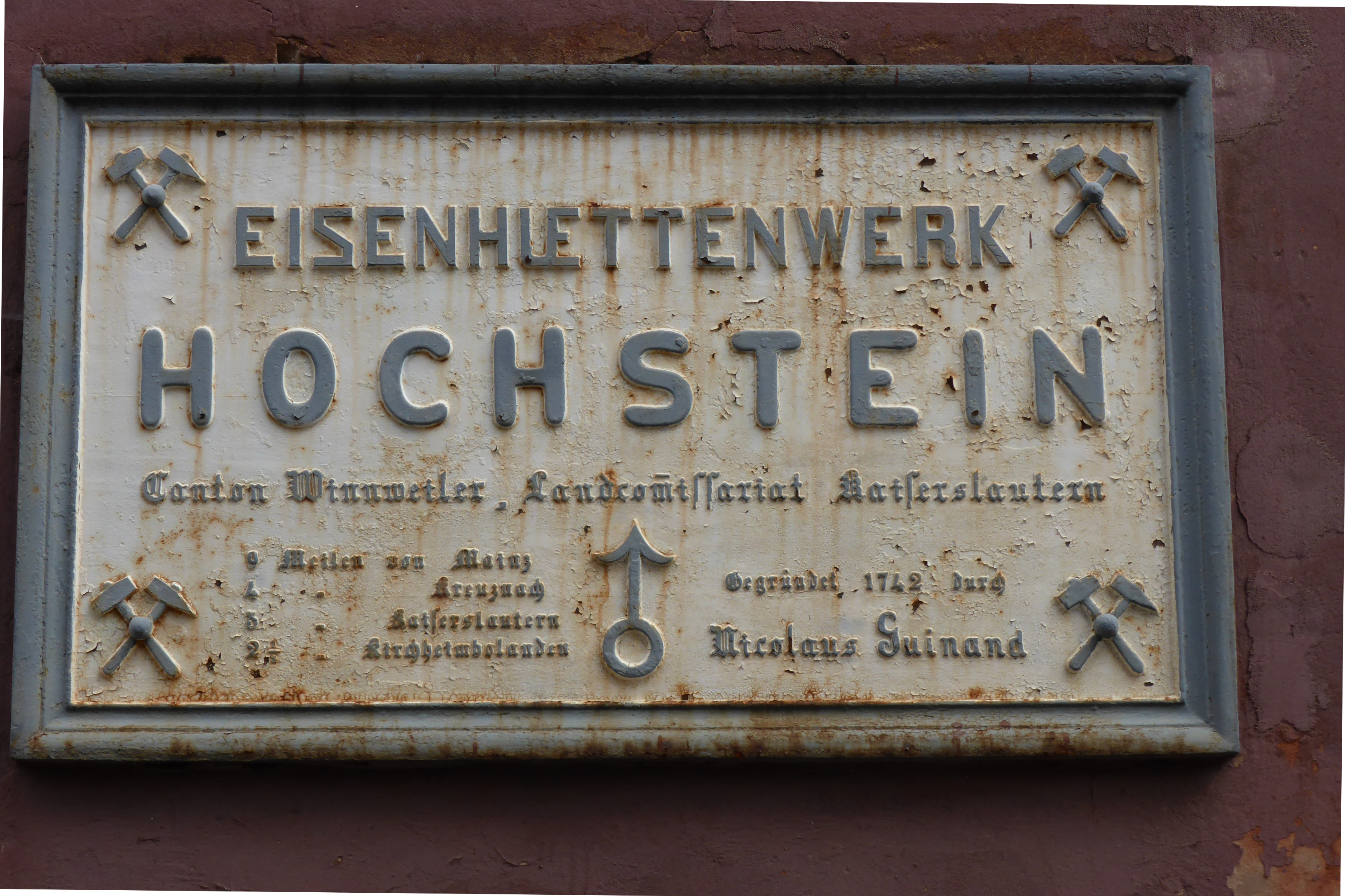 Gusseiserne Plakette in Winnweiler-Hochstein